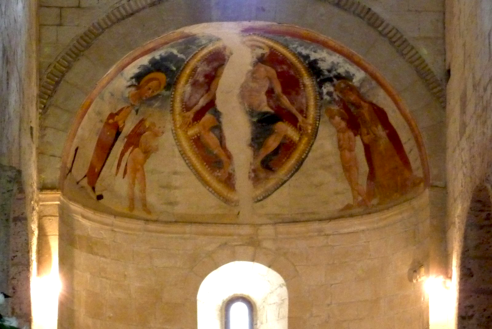 Chiesa di San Giovanni ad insulam, affresco dell'abside dell'edificio religioso appartenente al complesso abbaziale omonimo nei pressi del paese di Isola del Gran Sasso in provincia di Teramo, Abruzzo, Italia